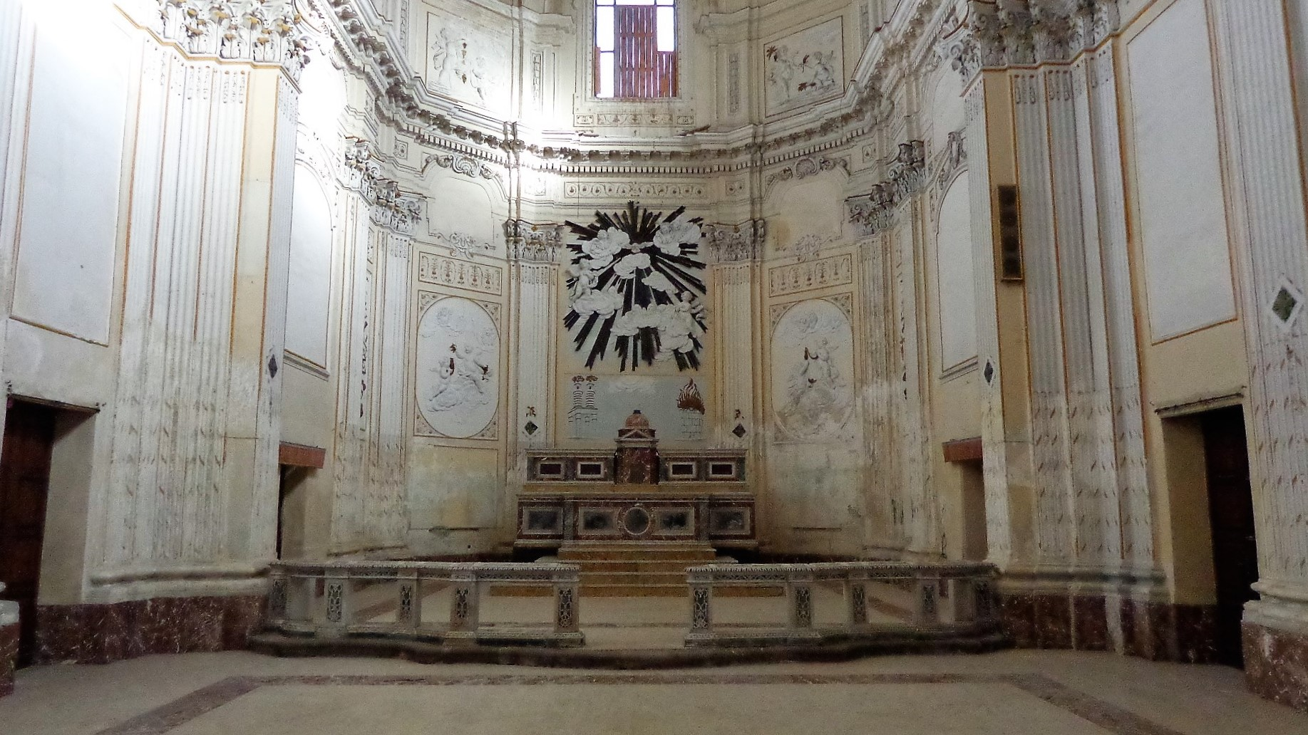 Presbiterio